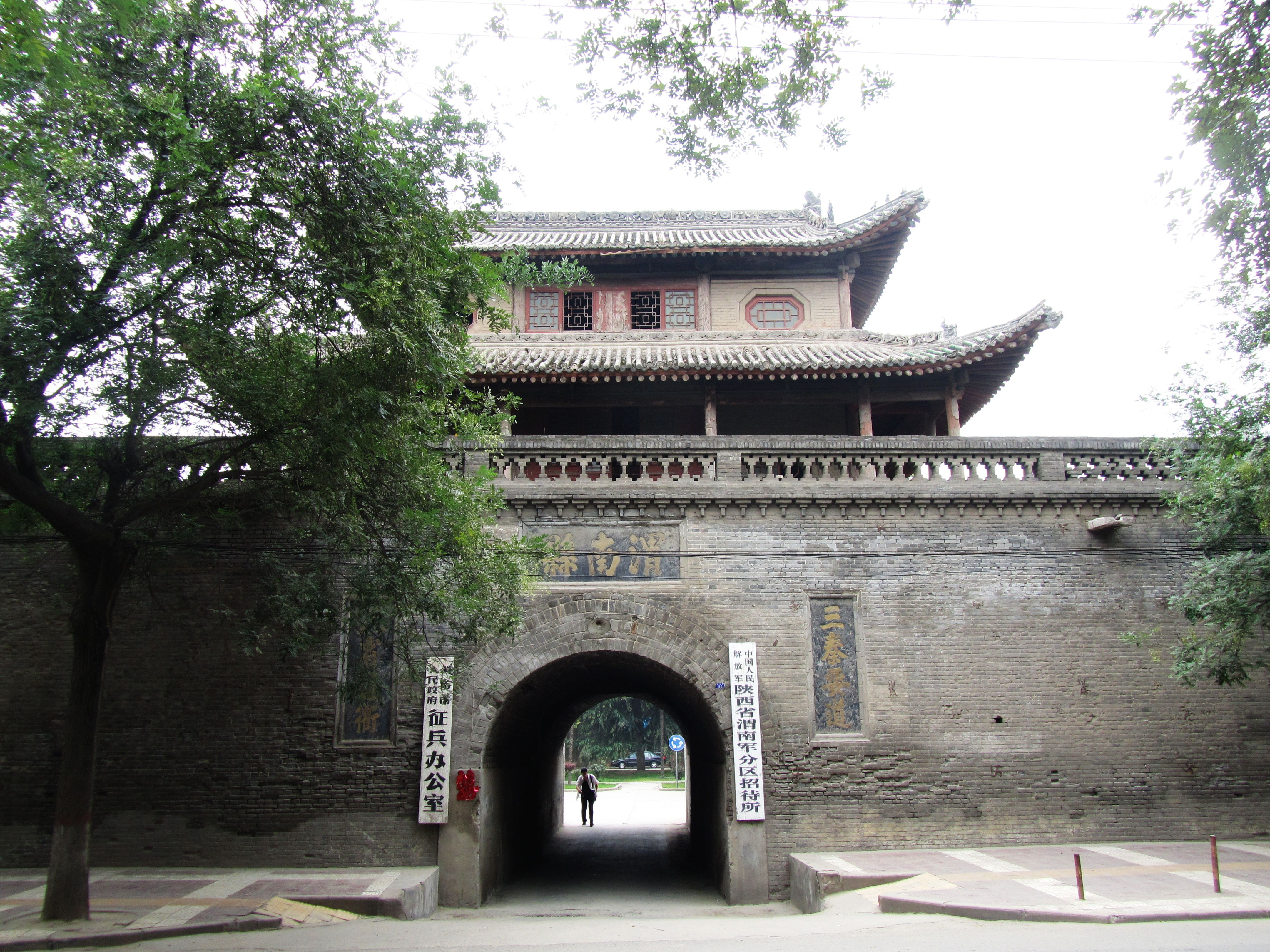 渭南鼓楼，南面正视。